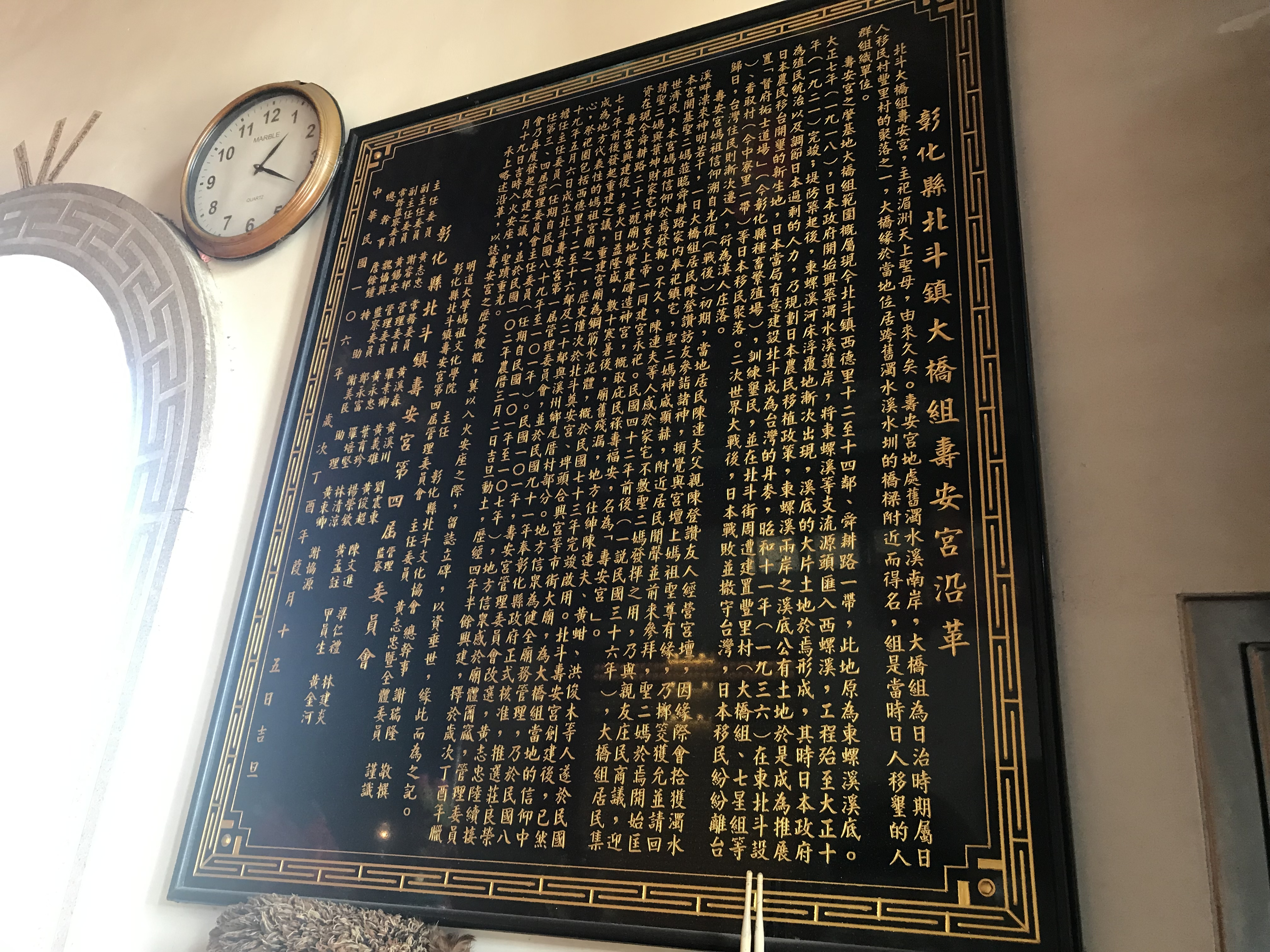 北斗大橋組壽安宮沿革